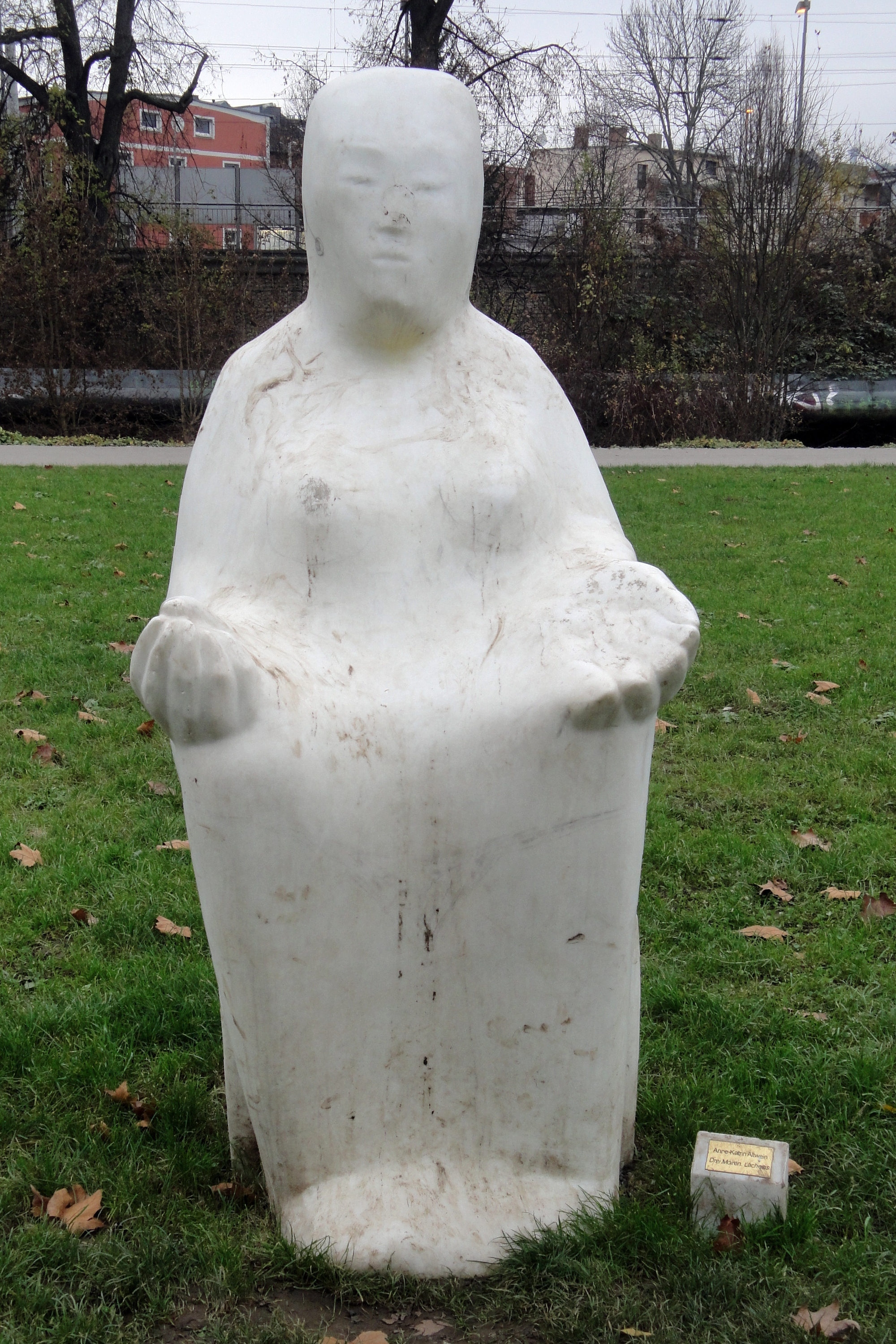 Skulptur "Drei Moiren: Lachesis" von Anne-Katrin Altwein in Jena